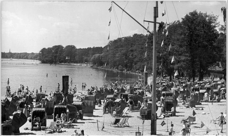 Berlin, Strandbad Rahnsdorf, Strandkörbe Zentralbild Sturm 7.6.1963 Im Strandbad Rahnsdorf läßt es sich aushalten bei diesen hochsommerlichen Temperaturen.